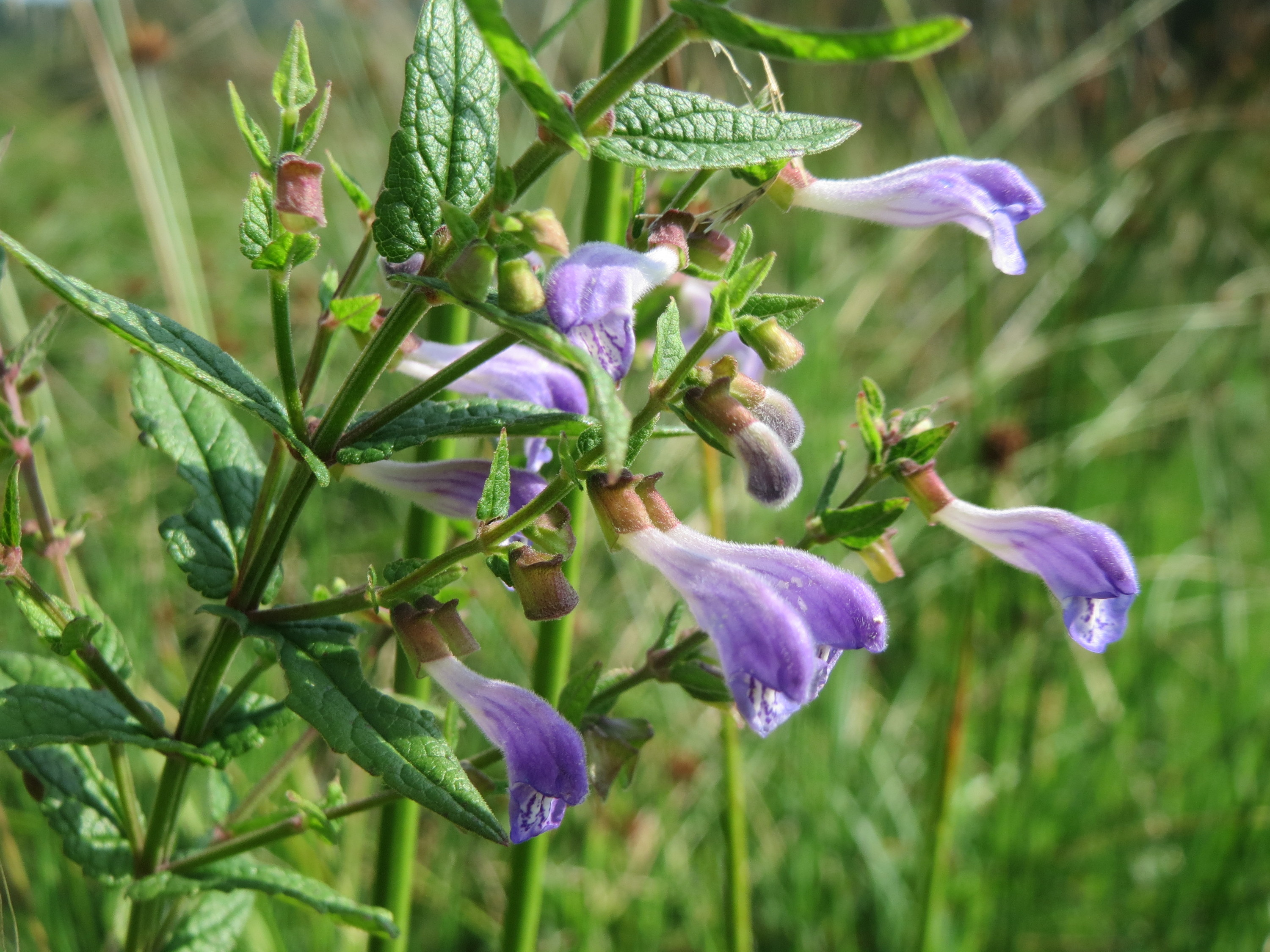 Sumpf-Helmkraut (Scutellaria galericulata) im Naturschutzgebiet Mürmes